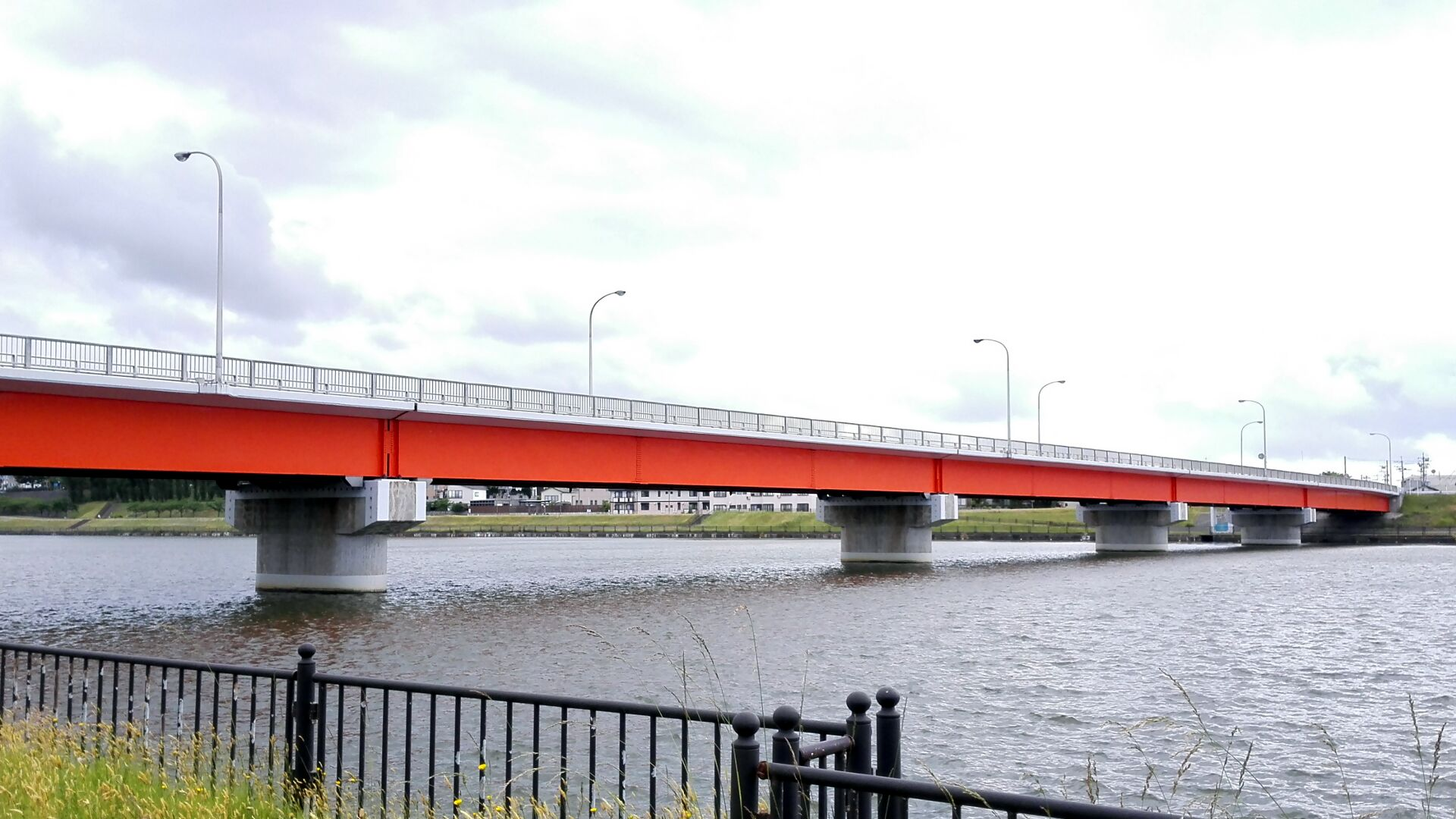 下流側から撮影